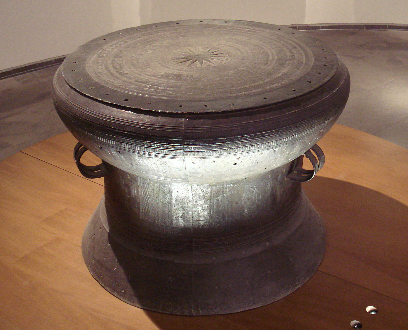 Drum From Song Da Vietnam. Dong Son II Culture. Mid 1st Millenium BCE. Bronze